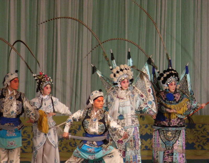 京剧《探谷·破敌》